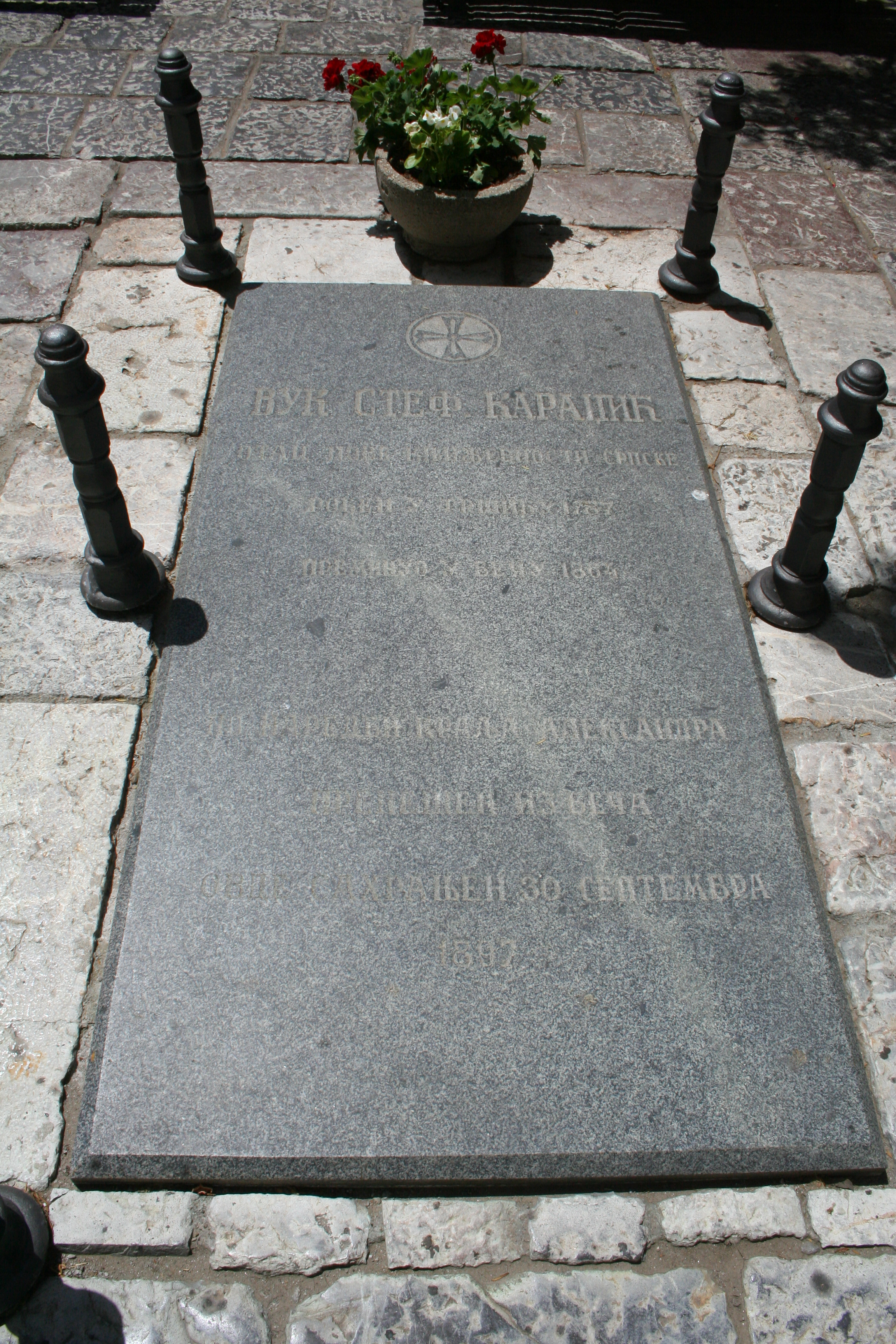 Гроб Вука Караџића у порти Саборне цркве